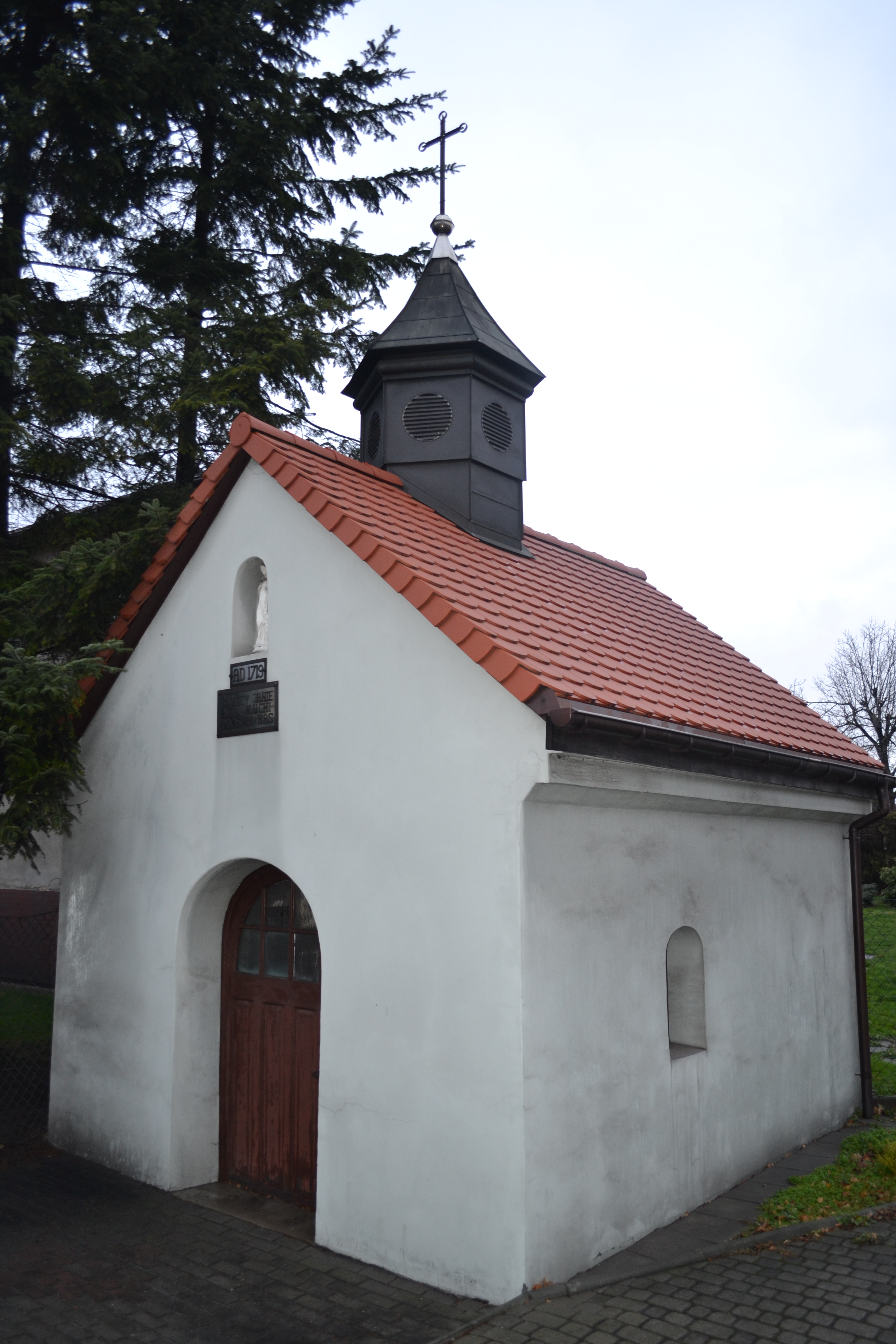 Kaplica św. Jana Nepomucena w Radlinie z 1719 roku